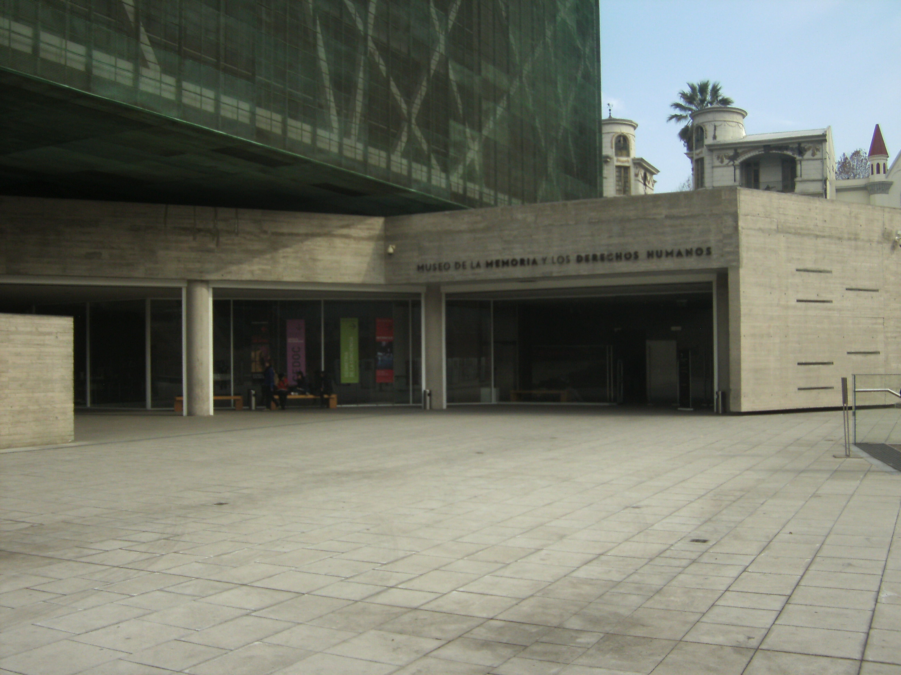 Plaza externa del Museo de la Memoria, lugar para realizar conciertos, películas y exposiciones transitorias.